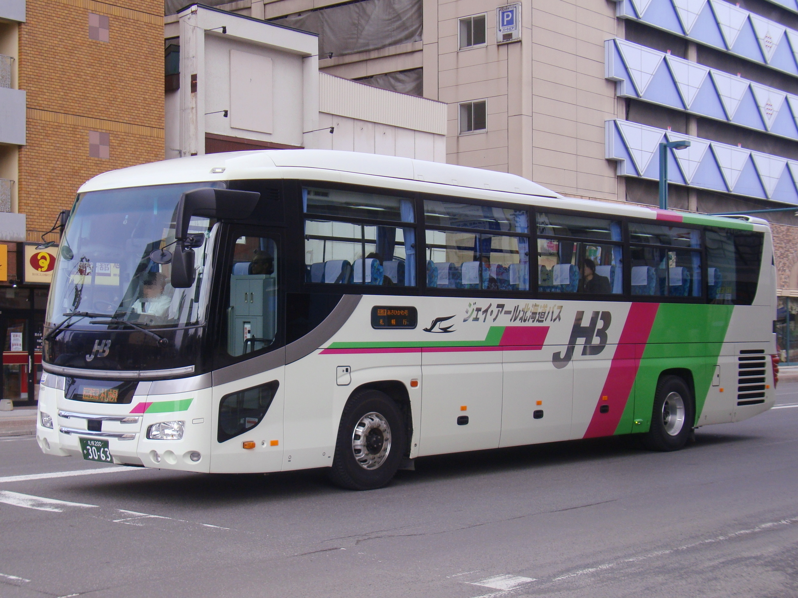 "Kōsoku Asahikawa gō" Asahikawa to Sapporo